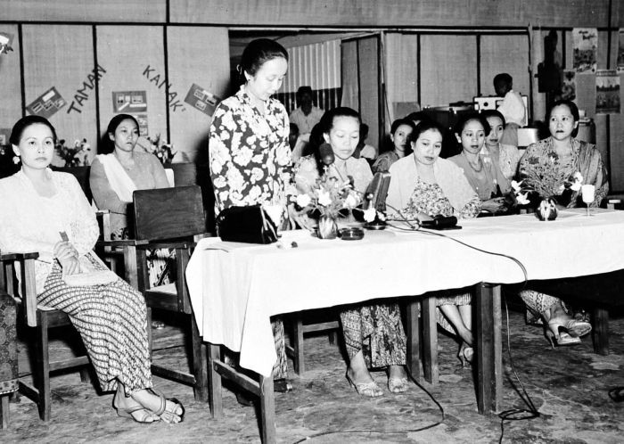 Repronegatief. In juni 1950 organiseerde de leiding van de KOWANI (Kongres Wanita Indonesia) in Djakarta een congres, dat door alle afdelingen in Indonesië werd bijgewoond. Mevr. Maria Ulfah Santoso als voorzitter van het Comité opende het congres.